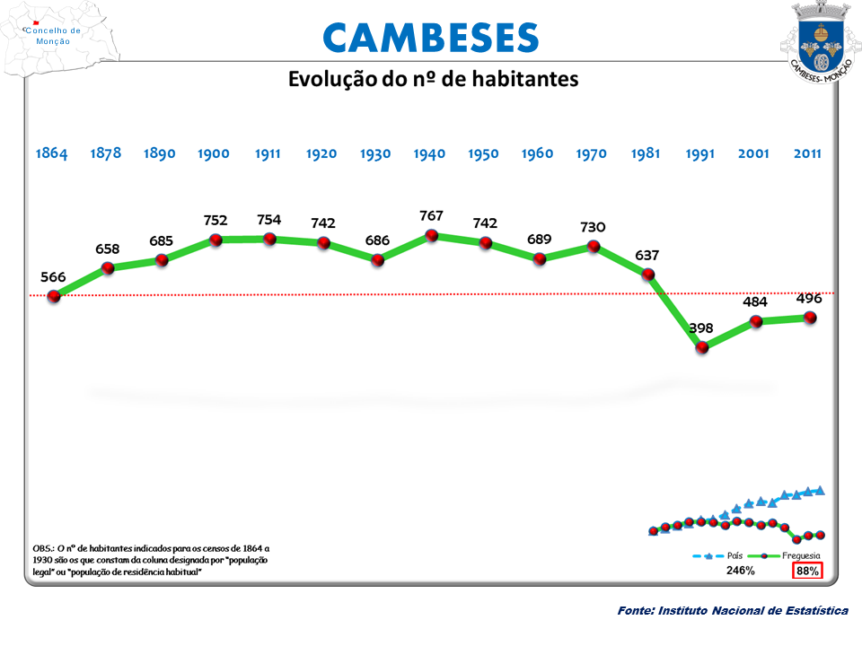 Censos 1864/2011